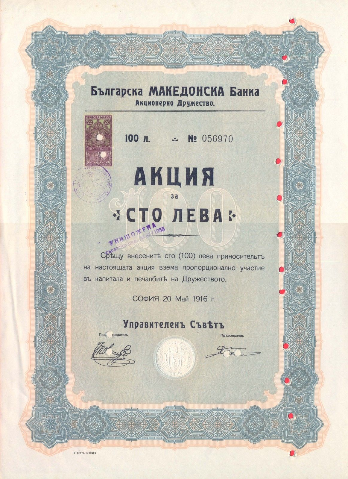 Акция на Българската македонска банка.